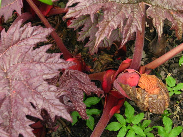 Rheum palmatum Atrosanguineum